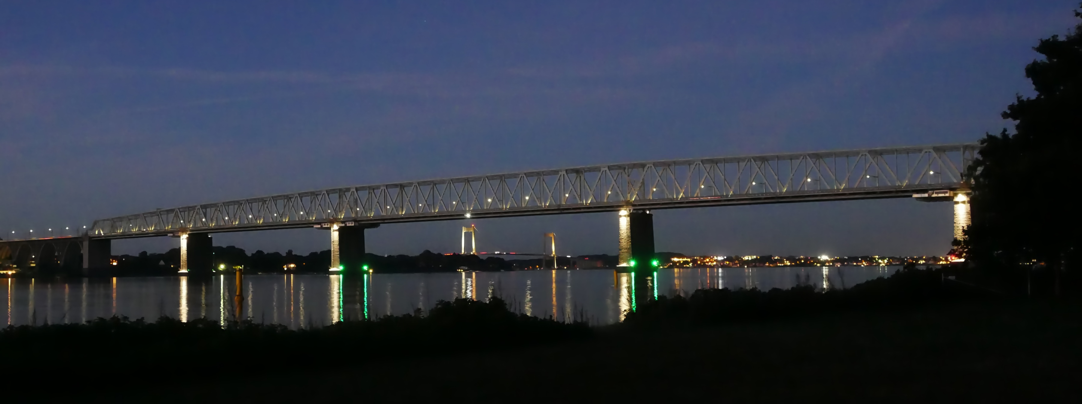 Kleiner Belt mit Beltbrücken. Im Vordergrund die alte Lillebæltsbro (Eisenbahn/Straßenbrücke) von 1935 und im Hintergrund die Ny Lillebæltsbro (Autobahnbrücke), die 1970 eröffnet wurde. Standort der Aufnahme: Tauchbasis auf Fyn südlich der alten Brücke.